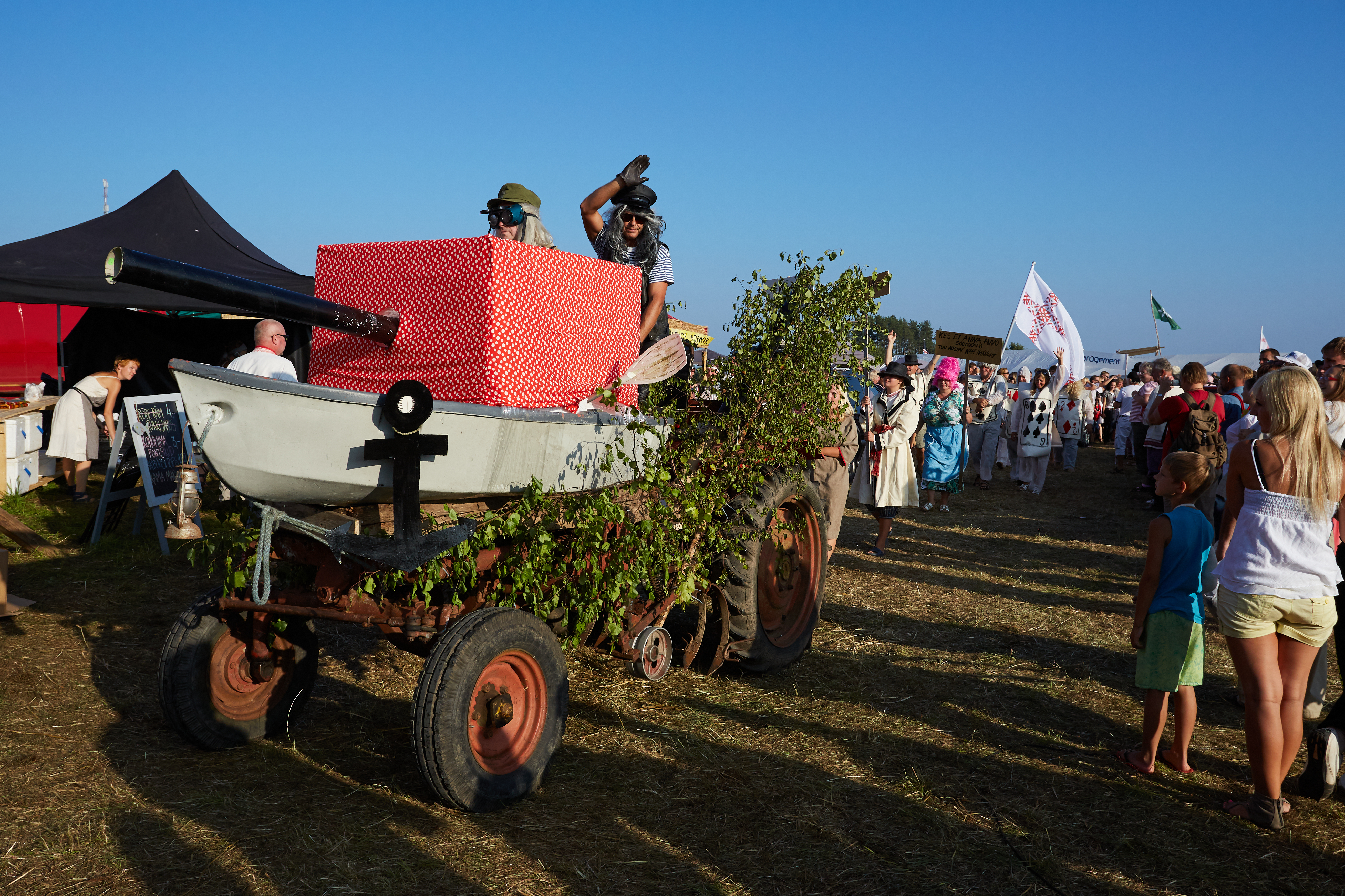 Seto kuningriigi sõjaväe paraad 2013. aastal Luhamaal